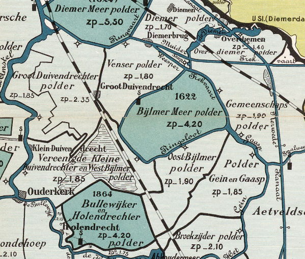 Bijlmermeerpolder